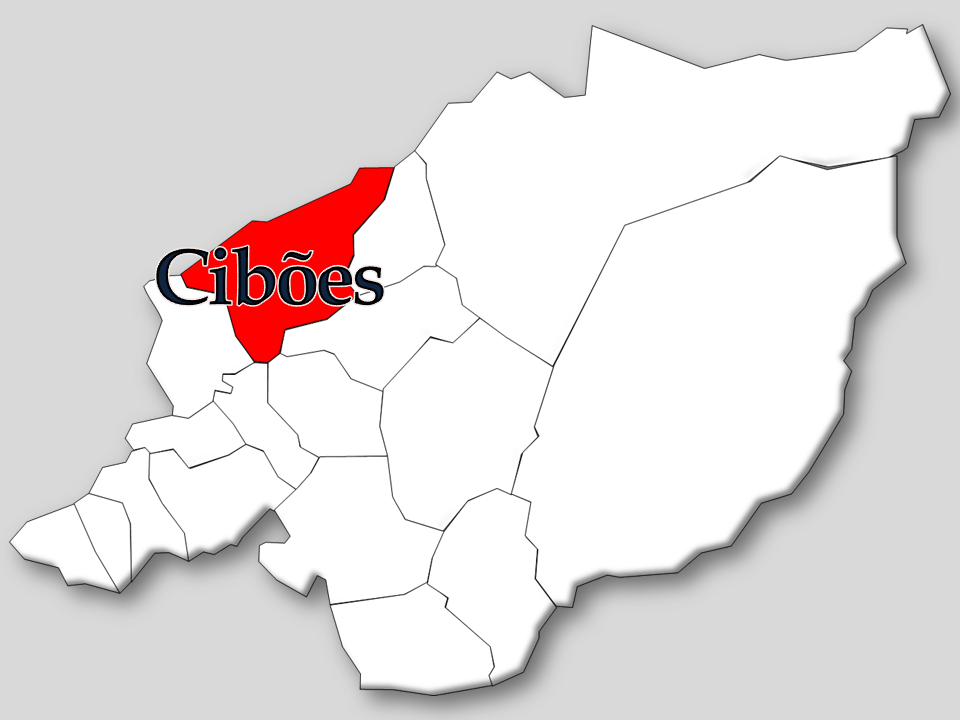 Censos 1864/2011